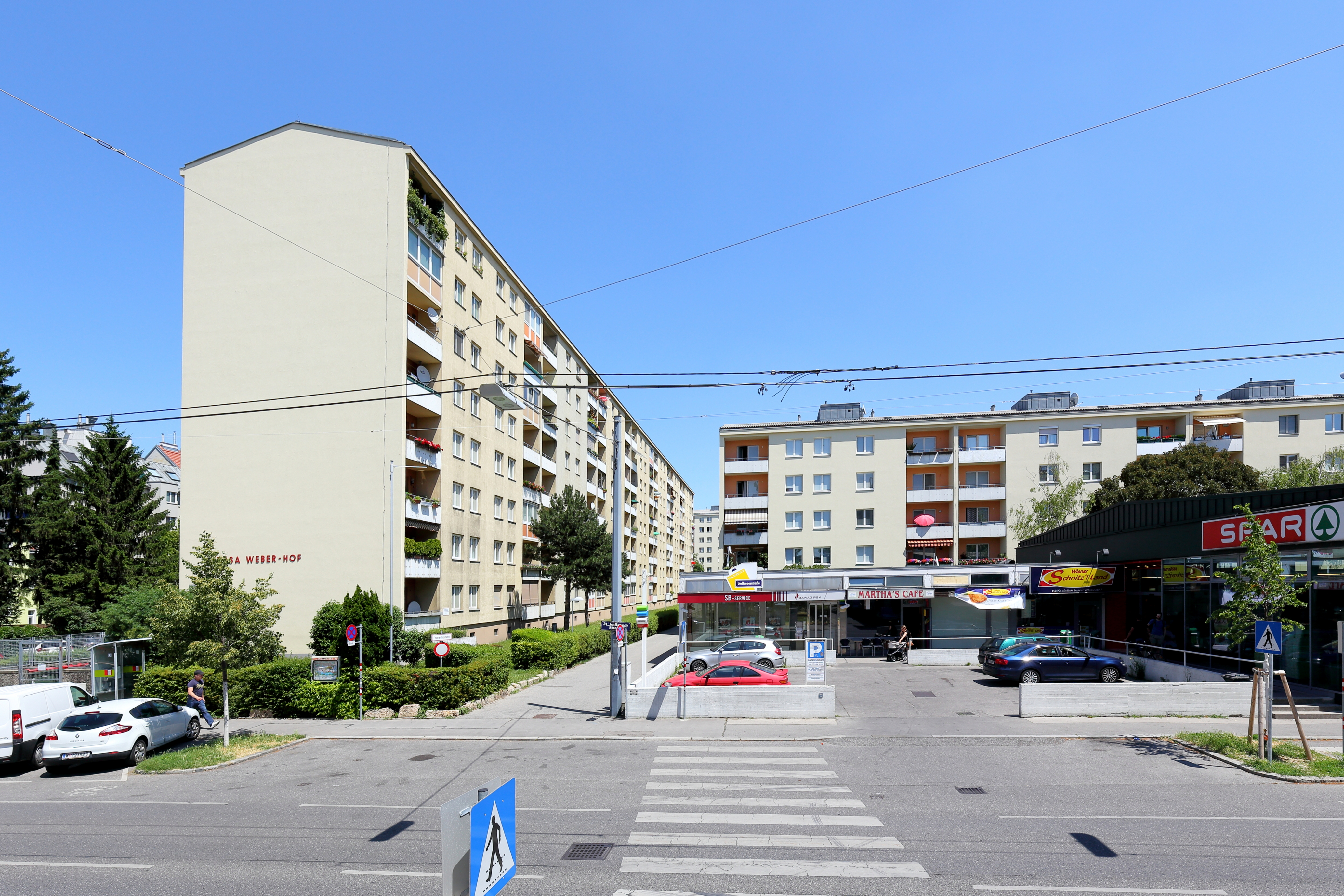 Westansicht der Wohnhausanlage „Rosa-Weber-Hof“ in Jedlesee, ein Bezirksteil des 21. Wiener Gemeindebezirkes Floridsdorf. Die Wohnhausanlage ließ der Wohnbauverein "Junge Generation" von der Baufirma Porr nach Plänen von Roland Rainer in den Jahren 1965 bis 1967 errichten. Benannt ist die Wohnhausanlage nach der SPÖ-Politikerin Rosa Weber. Sie wird von den Straßen Jedleseer Straße, Voltagasse, Helmholtzgasse und Anton-Störck-Gasse umschlossen.